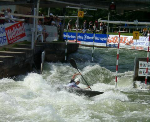 (Original text: Kanuslalom, Weltcup 2002 in Augsburg Damen-Semifinale Sonntag, 21. Juli 2002)